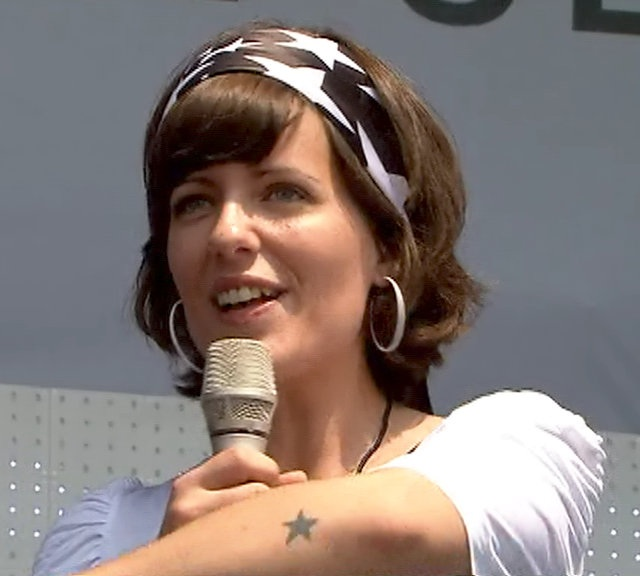 Sarah Kuttner, 2007.